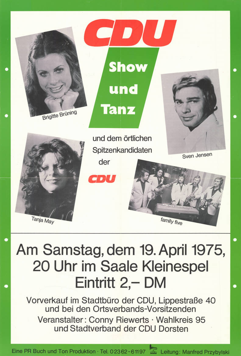 CDU Show und Tanz und dem örtlichen Spitzenkandidaten der CDU ... Eine PR Buch und Ton Produktion ... Kommentar: Mit den Künstlern: Brigitte Brüning, Tanja May, Sven Jensen, family five. Auf der Rückseite miit Filzschreiber beschriftet Plakatart: Ankündigungsplakat Auftraggeber: Veranstalter: Conny Riewerts und Stadtverband der CDU Dorsten Objekt-Signatur: 10-009 : 781 Bestand: Landtagswahlplakate Nordrhein-Westfalen (10-009) GliederungBestand10-18: Landtagswahlplakate Nordrhein-Westfalen (10-009) » CDU Lizenz: KAS/ACDP 10-009 : 781 CC-BY-SA 3.0 DE